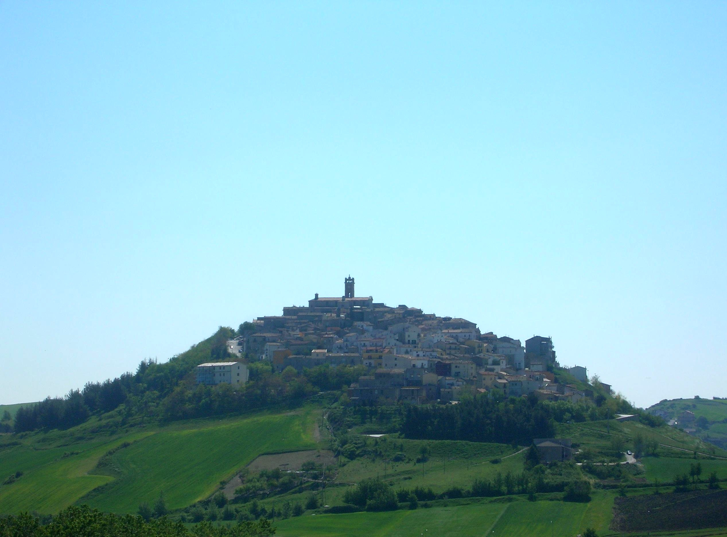 Veduta di Forenza (PZ)